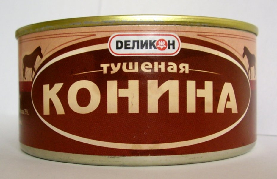 Конина